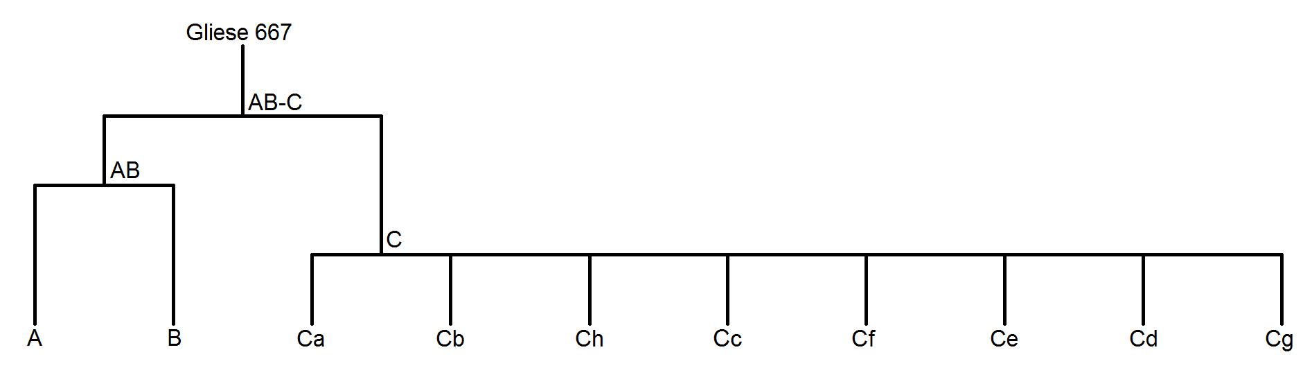 Diagramme cladistique représentant la hiérarchie des composantes du système Gliese 667.